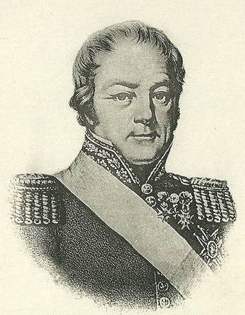 Charles Sapinaud de La Rairie (1760-1829)